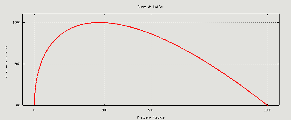 Approssimazione della Curva di Laffer da dati vari, approssimati con scarto quadratico medio © 2004 BlakWolf